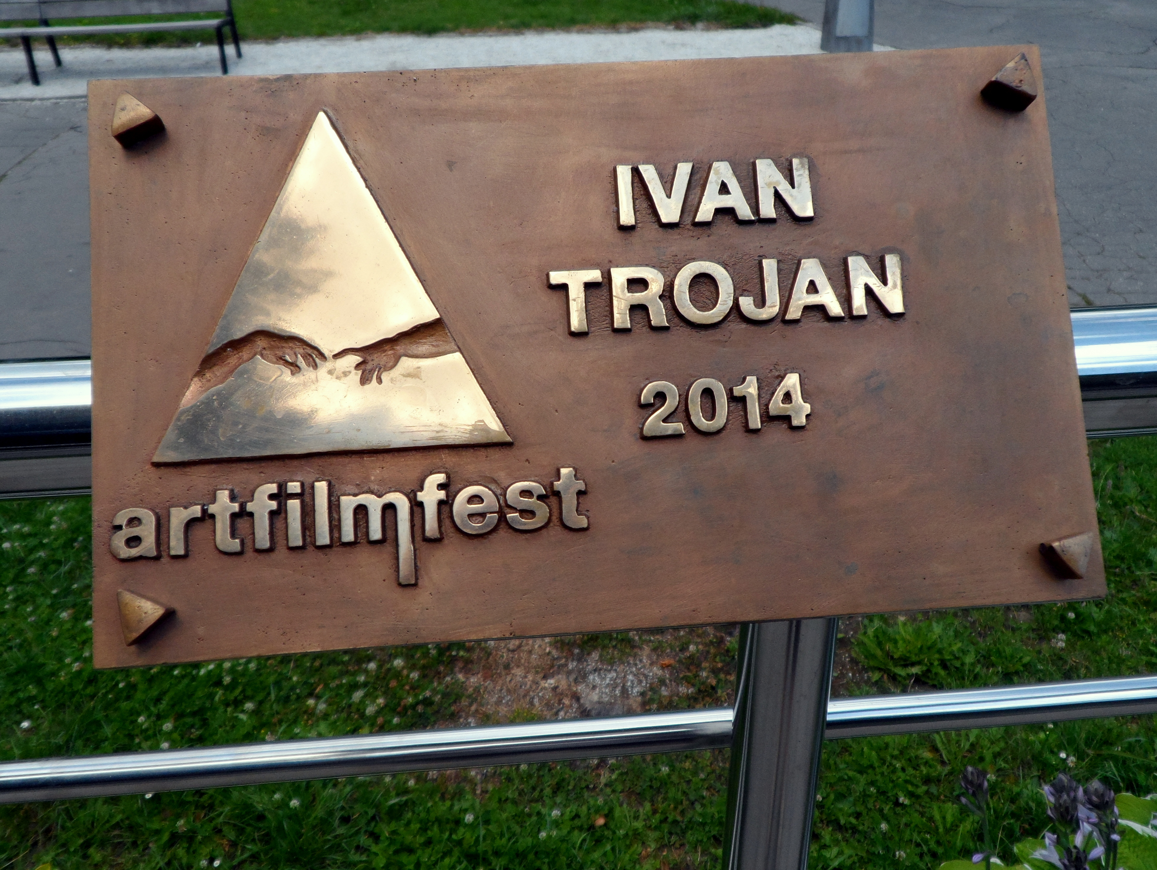 Mosadzná plaketa: „HERCOVA MISIA“ (Actor‘s Mission Award). Medzinárodný filmový festival Art Film Fest, Trenčianske Teplice 2014